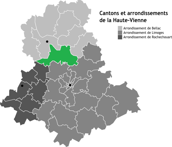 Canton de Nantiat, Limousin, France en Carte des arrondissements de la Haute-Vienne